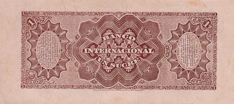 1 эквадорский сукре. Выпуск Интернационального Банка, Эквадор. Реверс.